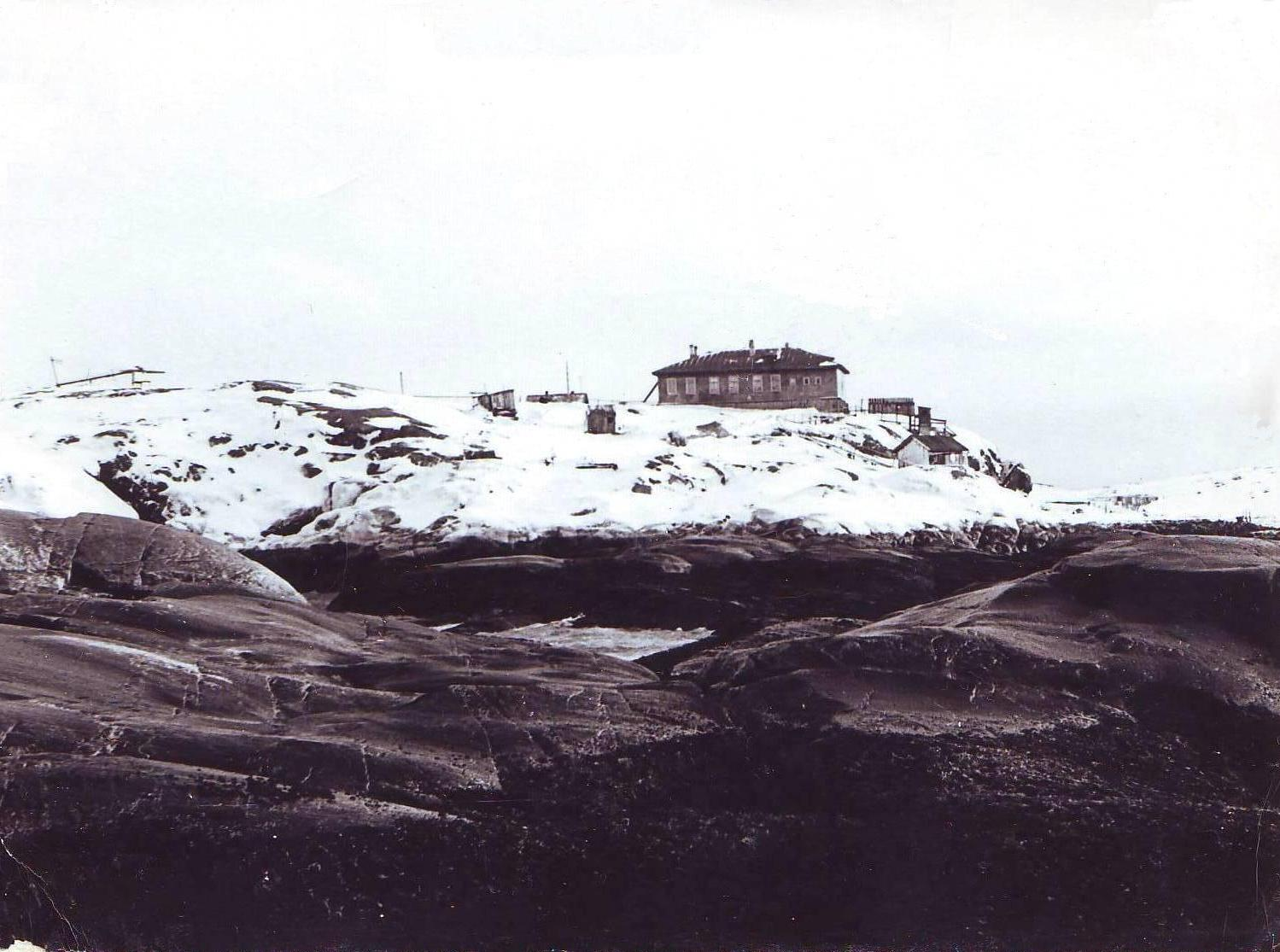 Вид с залива, 1974 г.